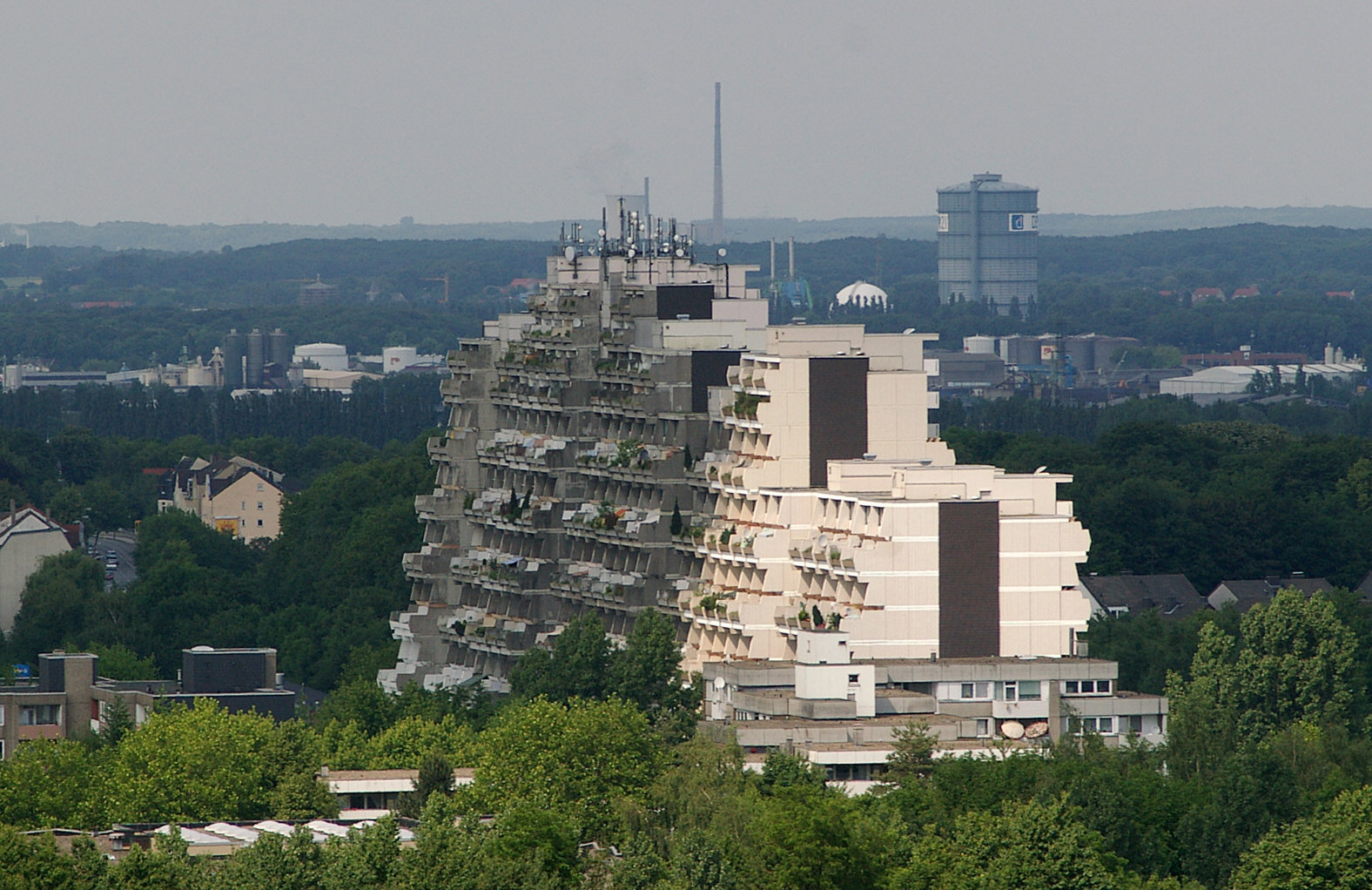 Der Wohnkomplex "Hannibal" in Dortmund-Dorstfeld vom Mathetower der UniDo aus gesehen